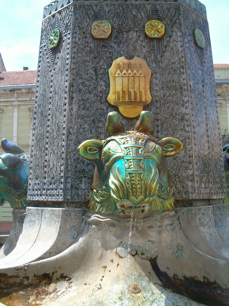 A Zsolnay-kút.